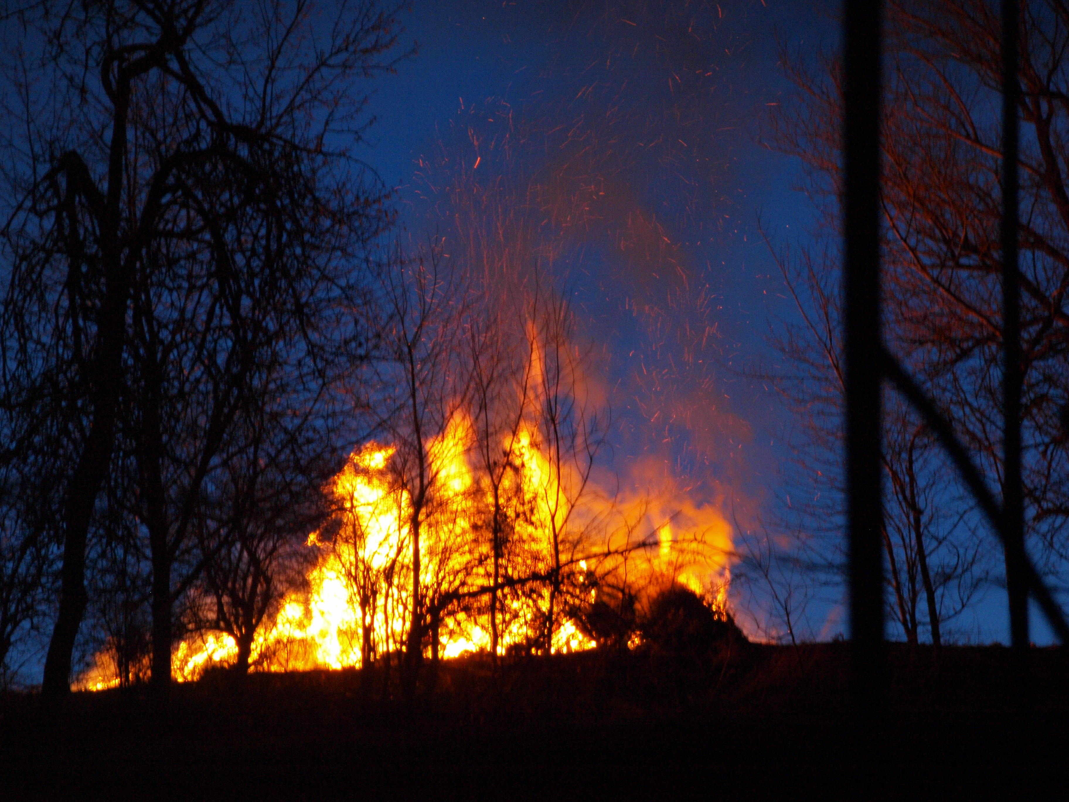 Hutzelfeuer in Burghaun im Jahr 2020